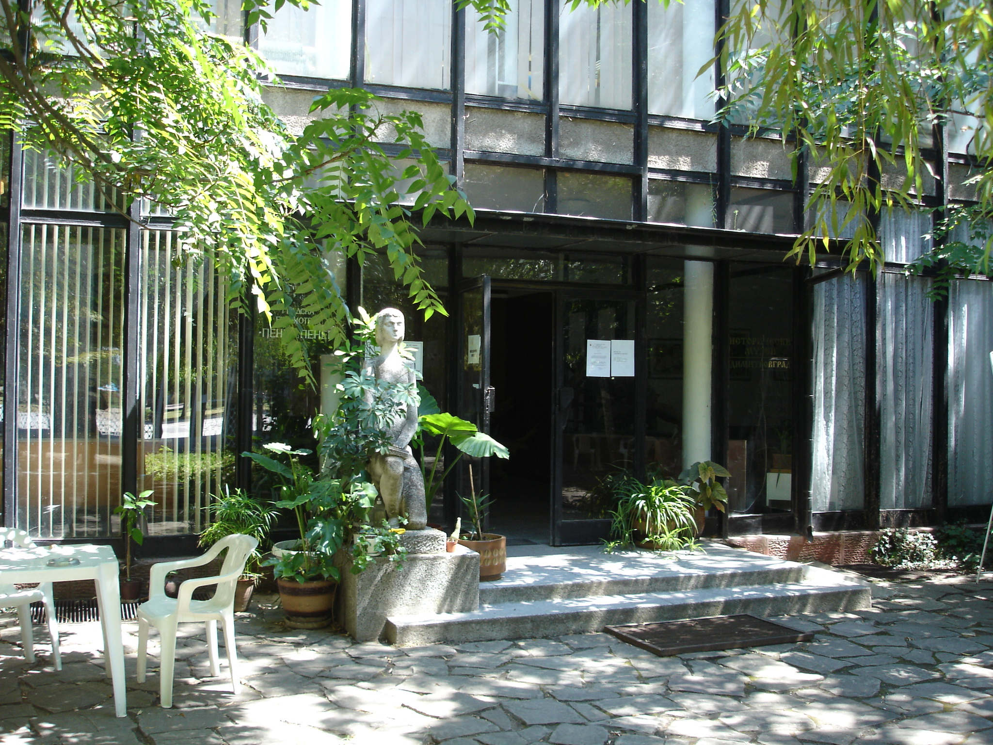 Museum in Dimitrovgrad, Bulgaria